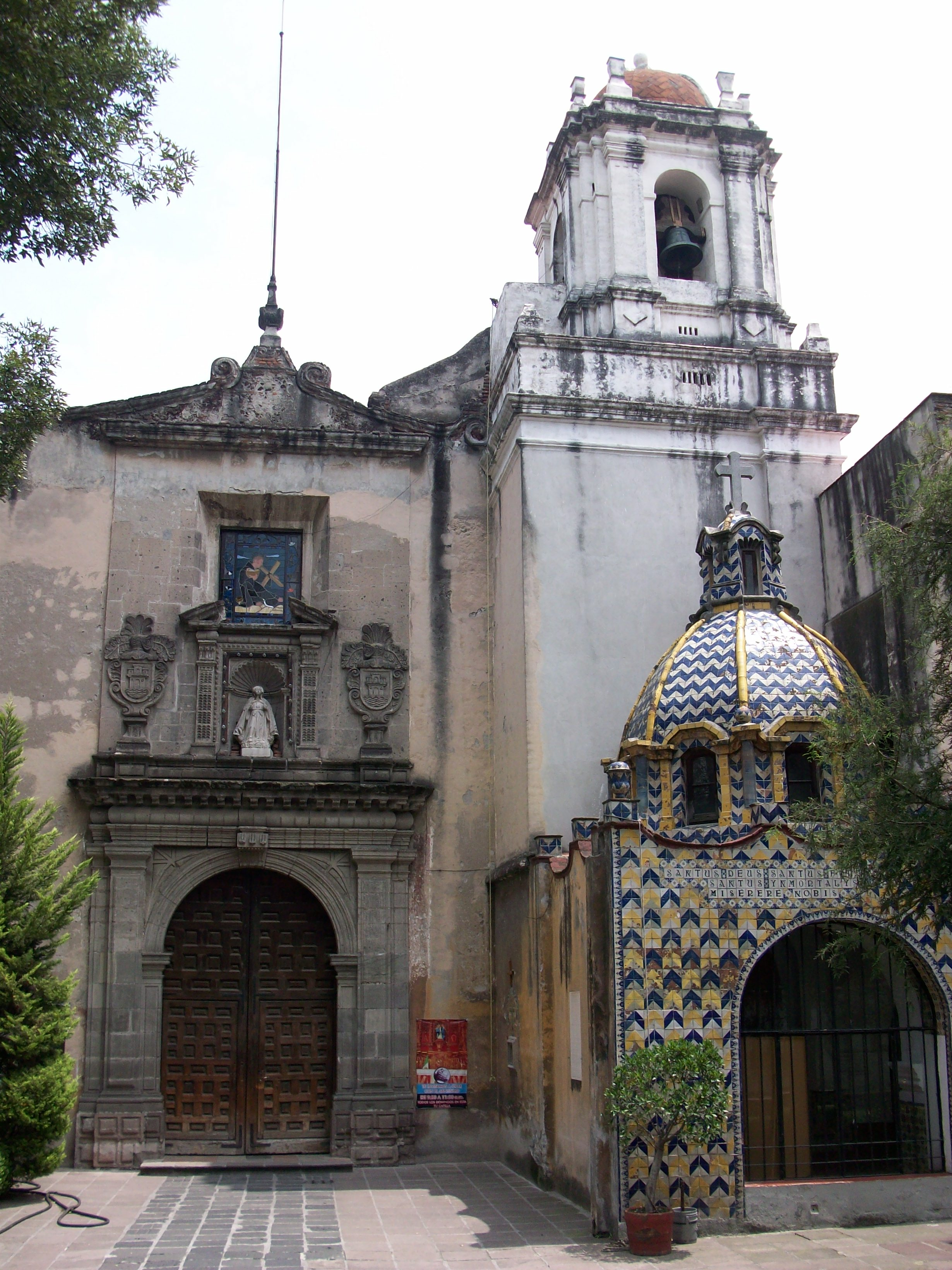 Templo y Ex Convento de San Diego Churubusco